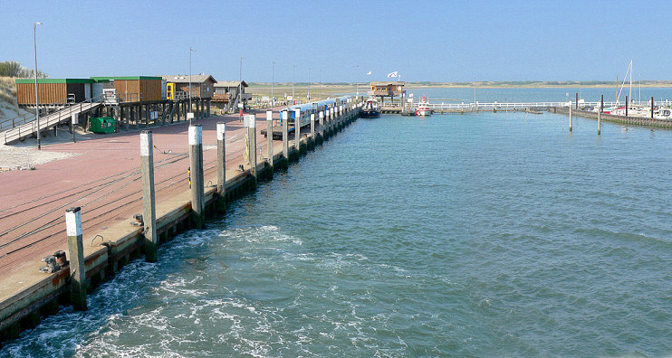 Westanleger Wangerooge mit Bahnlinie